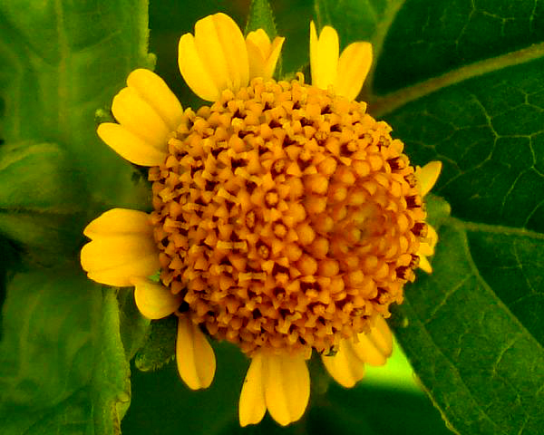 പല്ലുവേദന ചെടി (Acmella oleracea, family Asteraceae) നിലത്ത് പടർന്ന് വളരുന്ന ഈ സസ്യത്തിന്റെ പൂവ് ഔഷധ ഗുണമുള്ളതാണ്. മഞ്ഞ നിറമുള്ള, ഒരു കമ്മൽ പോലെയുള്ള ഈ പൂവ് വായിലിട്ട് ചവച്ചാൽ ഗ്രാമ്പുവിന്റെ രുചിയാണ്. പല്ല് വേദനയുള്ളപ്പോൾ ഈ പൂവിലൊന്ന് പറിച്ചെടുത്ത് വേദനയുള്ള ഭാഗത്ത് കടിച്ചുപിടിച്ചാൽ ധാരാളം ഉമിനീർ വരികയും ഒപ്പം വേദന മാറുകയും ചെയ്യും. പൂവിന്റെ ഔഷധപ്രാധാന്യം മനസ്സിലാക്കിയ നാട്ടിൻപുറത്തുകാർ ചെടി നശിക്കാതെ സംരക്ഷിക്കാറുണ്ട്. ചെടിയുടെ ഔഷധഗുണമുള്ള പൂവ് വലുതാക്കി കാണിച്ചിരിക്കുന്നു. അടിവശത്തുള്ള വിത്തിന്റെ ഭാഗം അമർത്തിയാൽ മാത്രമാണ് ഗ്രാമ്പുവിന്റെ രുചിയും ഗന്ധവും ഉള്ളത്.